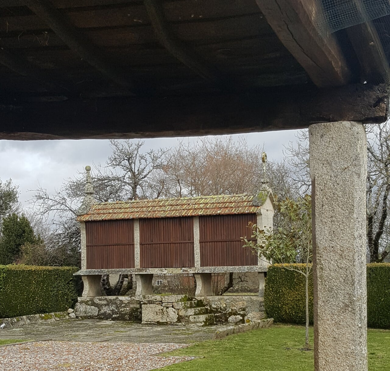 Lugar de Mancegar, que se distribue entre as parroquias de Vilapoupre e Alvidrón. A dispersión de vivendas dentro do lugar fai que se distinga entre Aldea de Riba e Aldea de Baixo a Outeiro. A fotografía corresponde á citada en primeiro lugar, pertencente á parroquia de Alvidrón (Antas de Ulla)